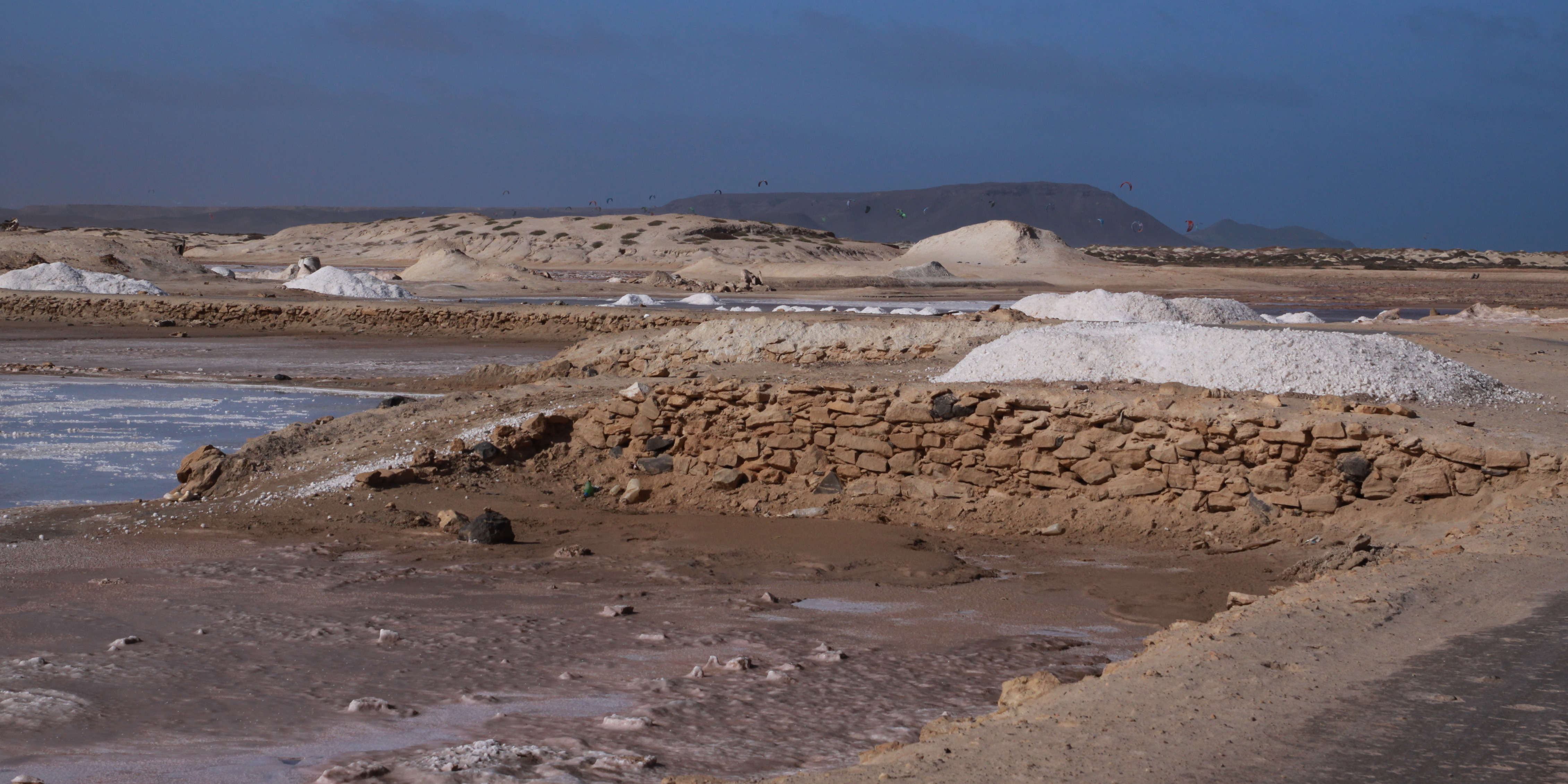 Santa-Maria, Sal, Cap-Vert. Un aperçu des salins au nord de la ville et de l'activité de « Kite Beach » en arrière plan.